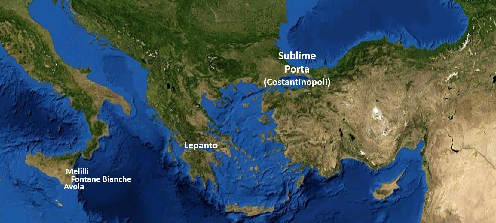 I luoghi nel siracusano dello sbarco ottomano, infine respinto, dopo la battaglia di Lepanto alla fine del 1500. Ritaglio da immagine originale: Mediterranean Sea 16.61811E 38.99124N.jpg